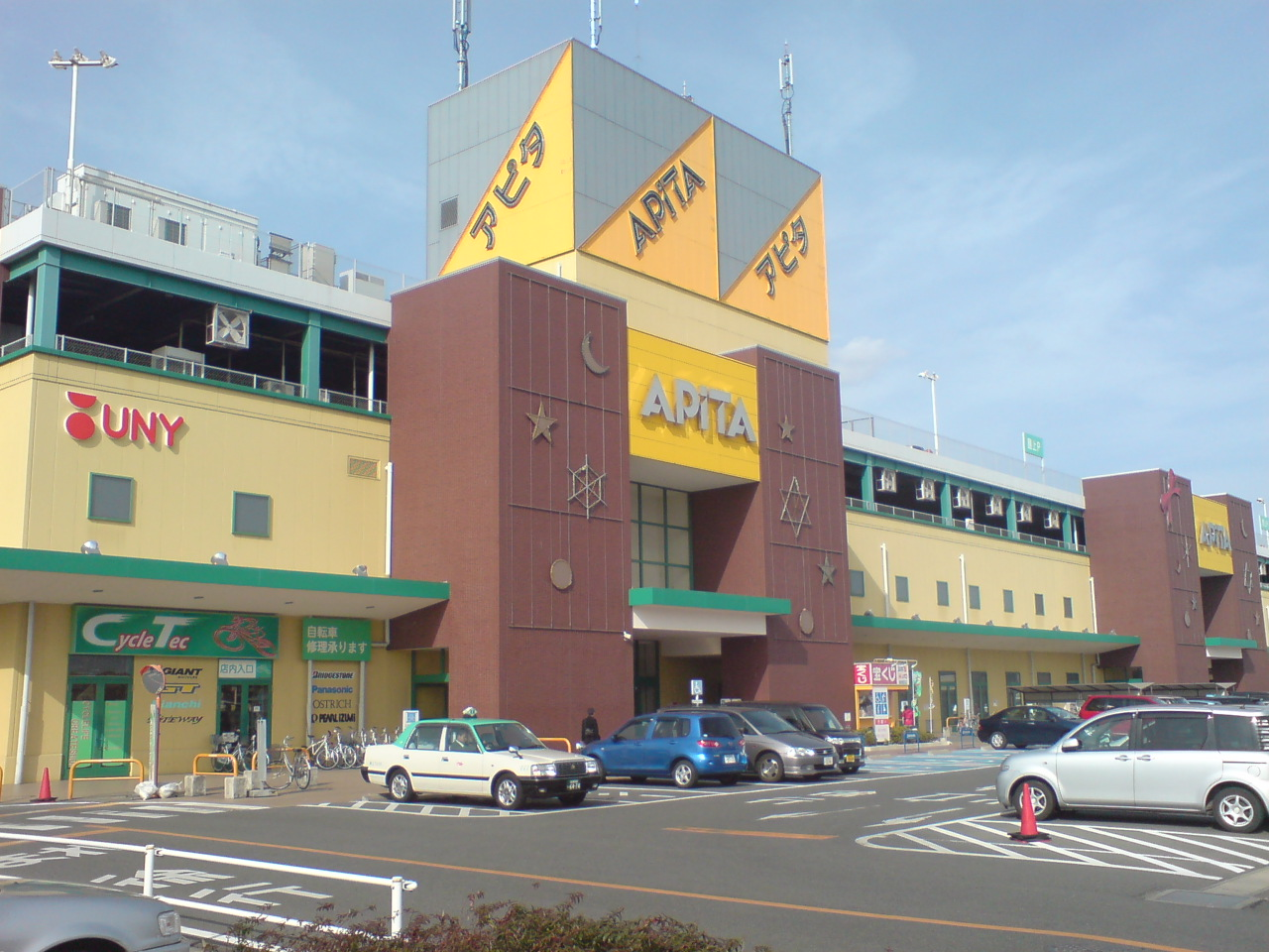 アピタ鳴海店店舗外観